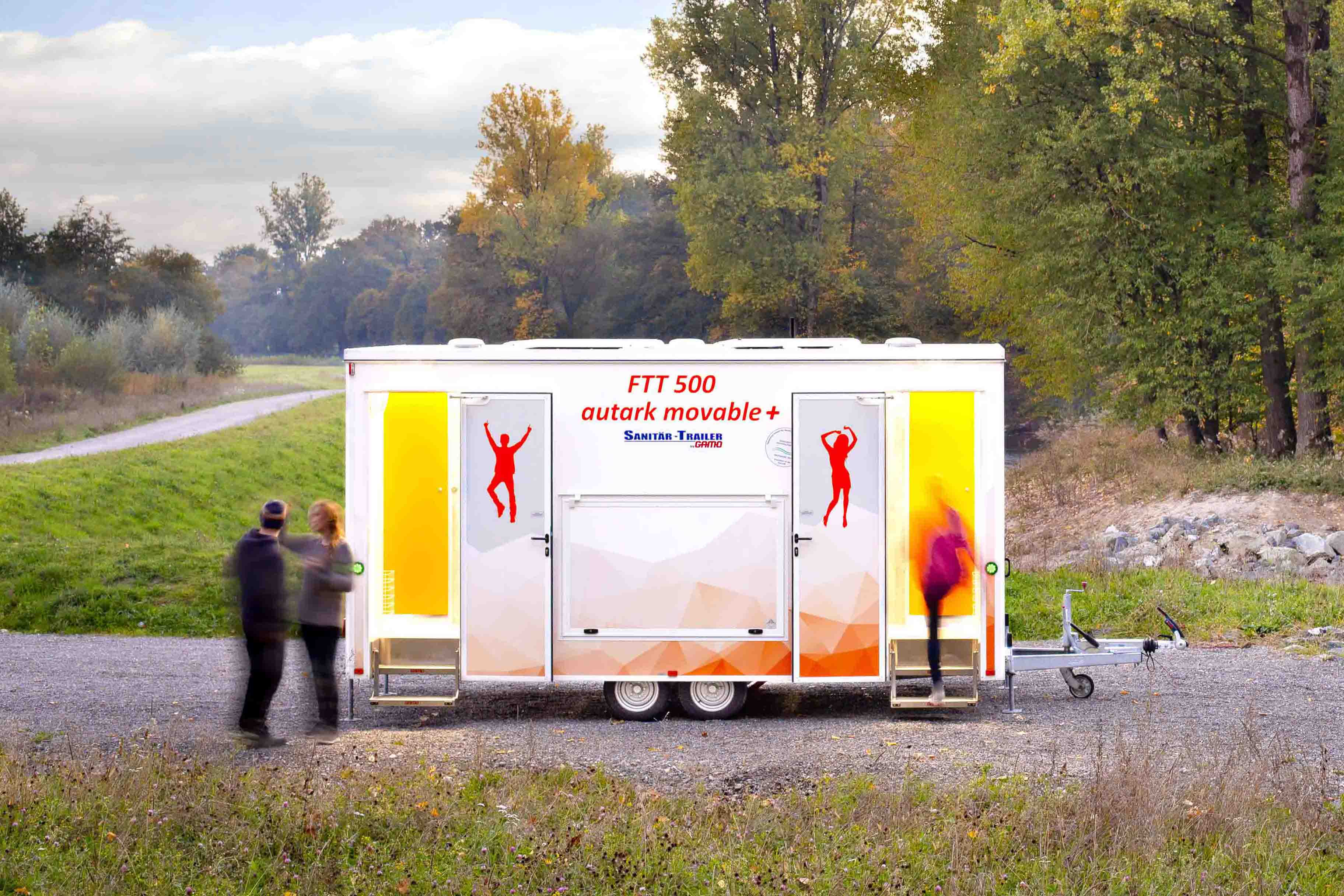 moderner autarker Toilettenwagen der Firma GAMO